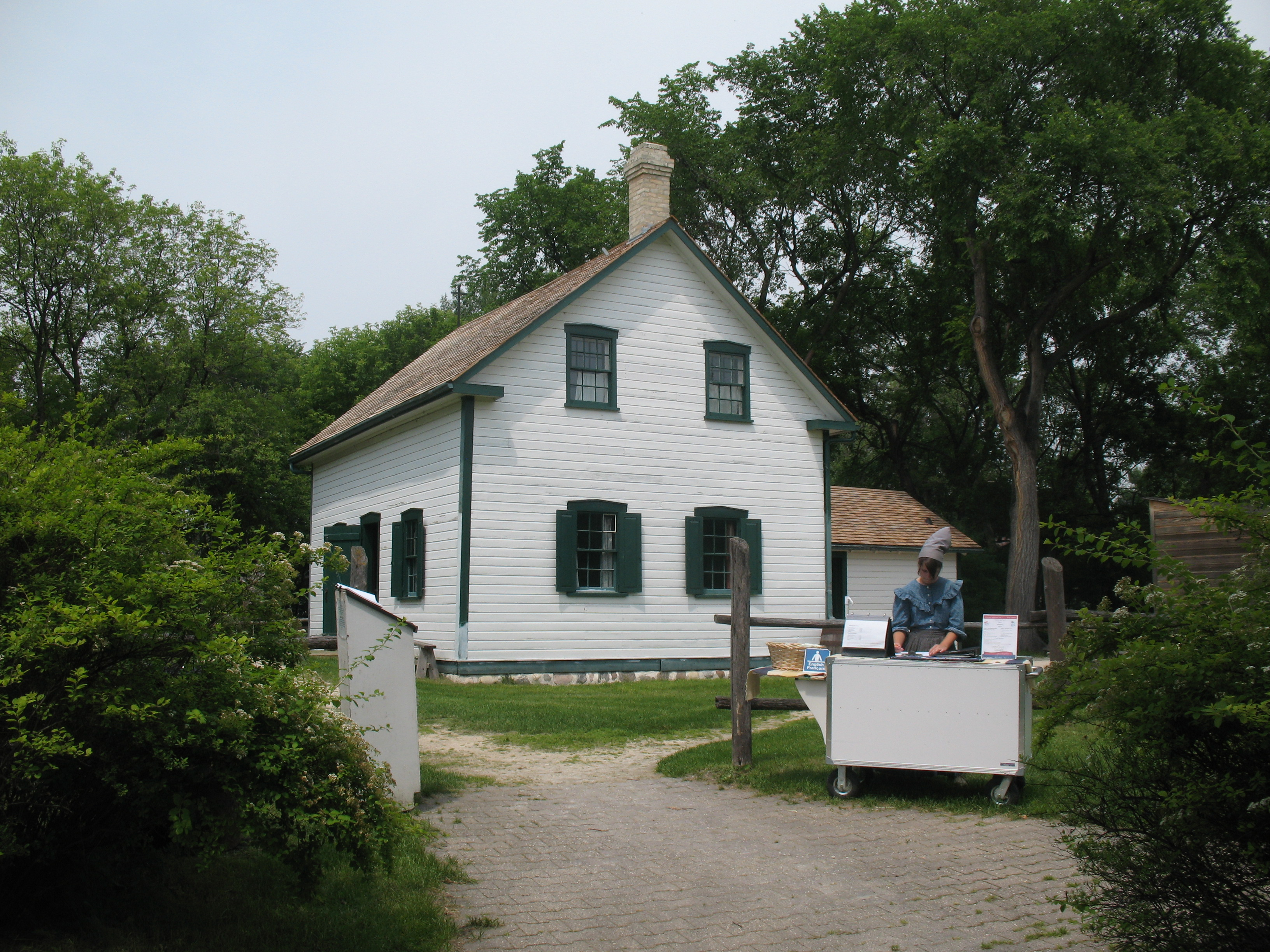 Das Louis Riel House in Winnipeg, Kanada